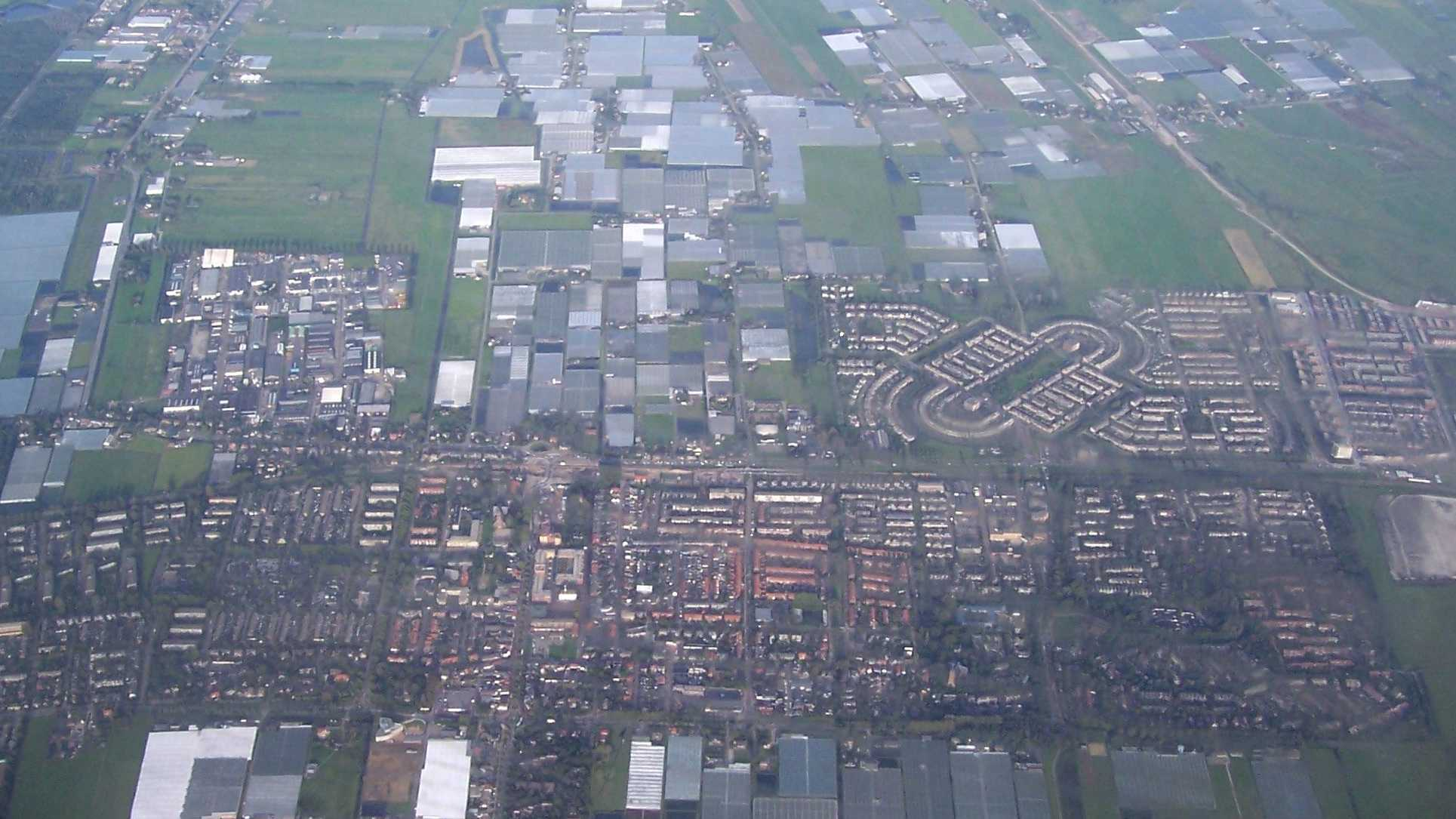 Categorie:Luchtfoto (Original text: “Luchfoto van Pijnacker”)